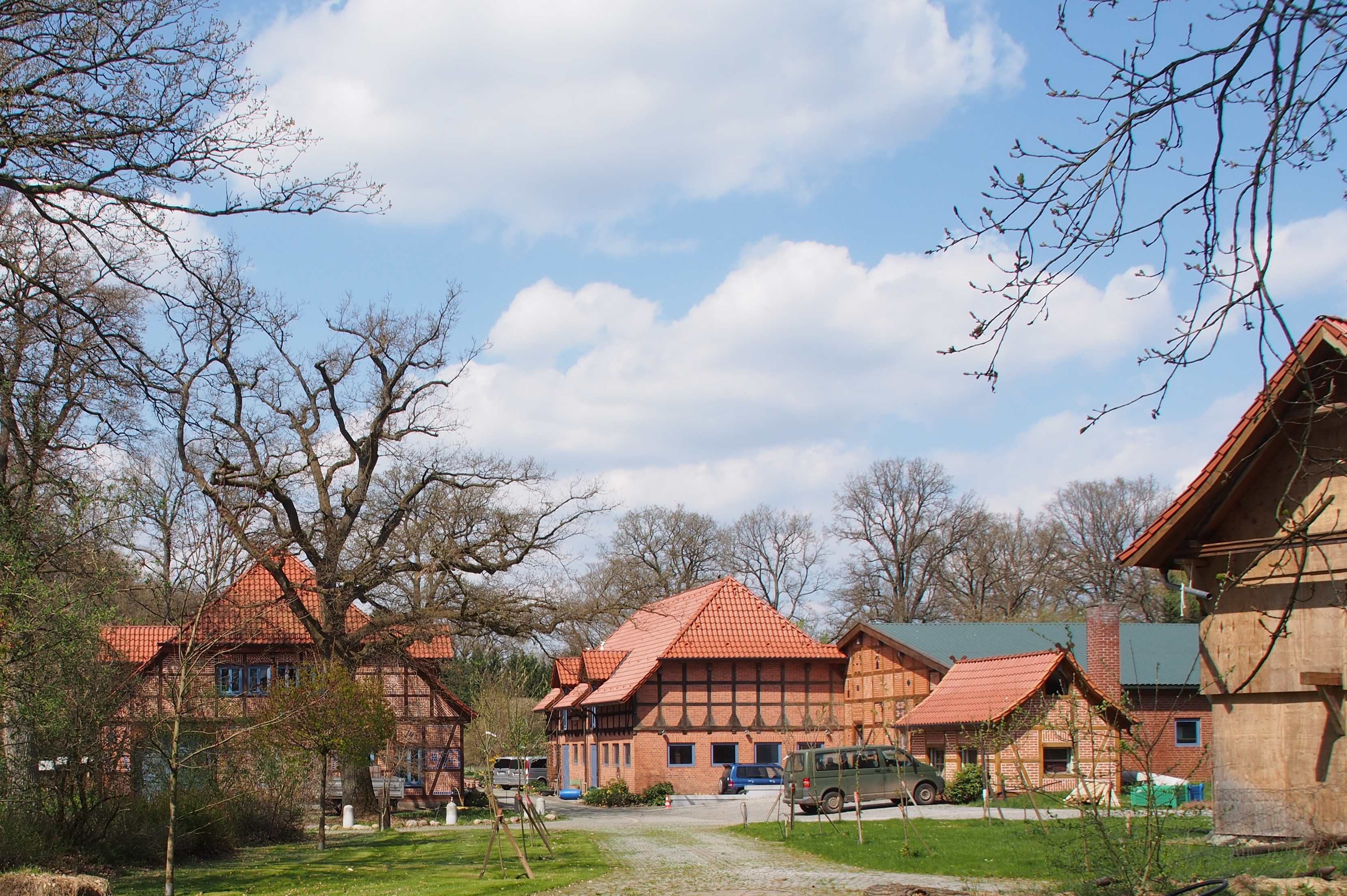 Bauernhof im Ortsteil Rebberlah, Heuweg 3, Gemeinde Eschede (Niedersachsen)